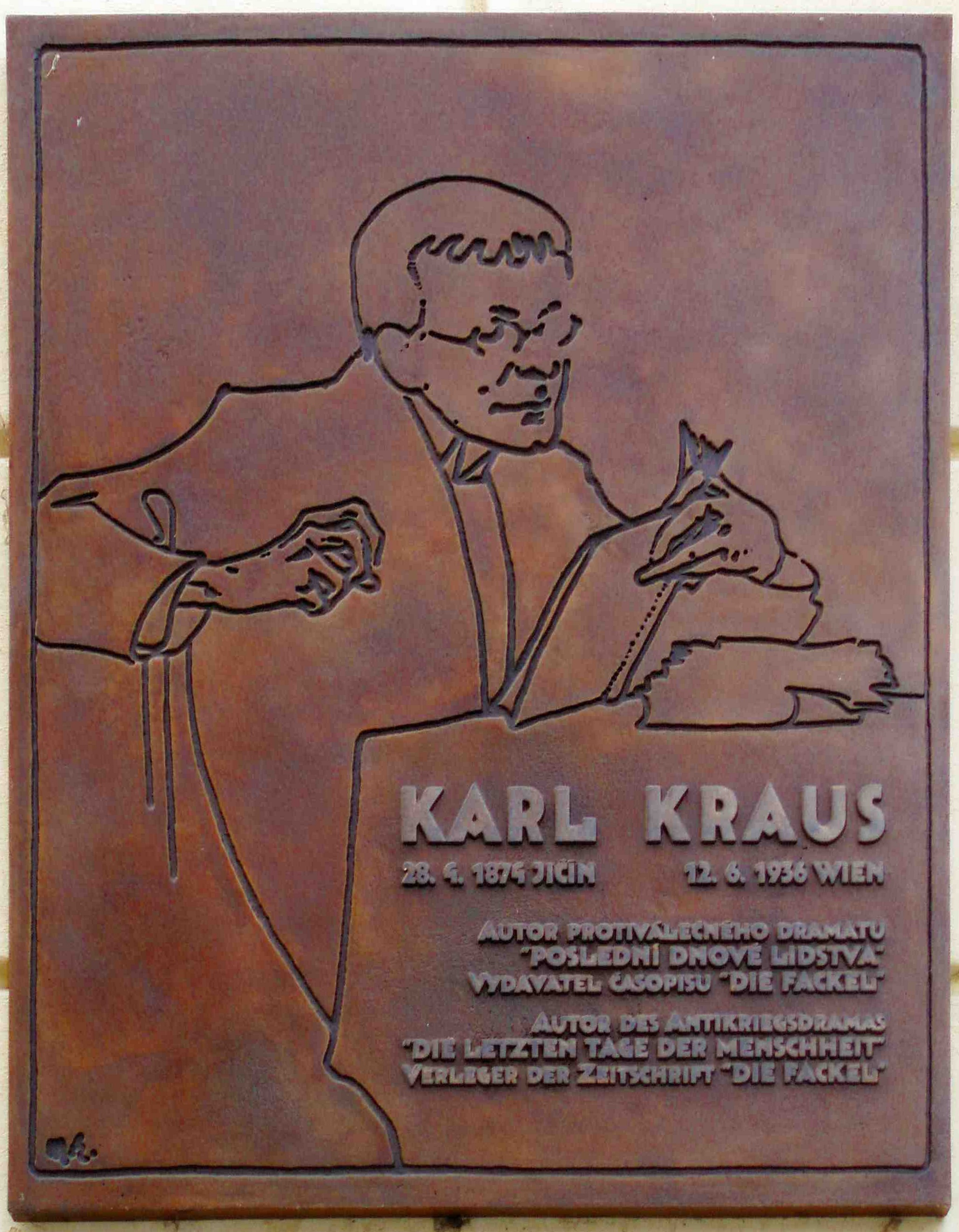 Karl-Kraus-Tafel am Geburtshaus